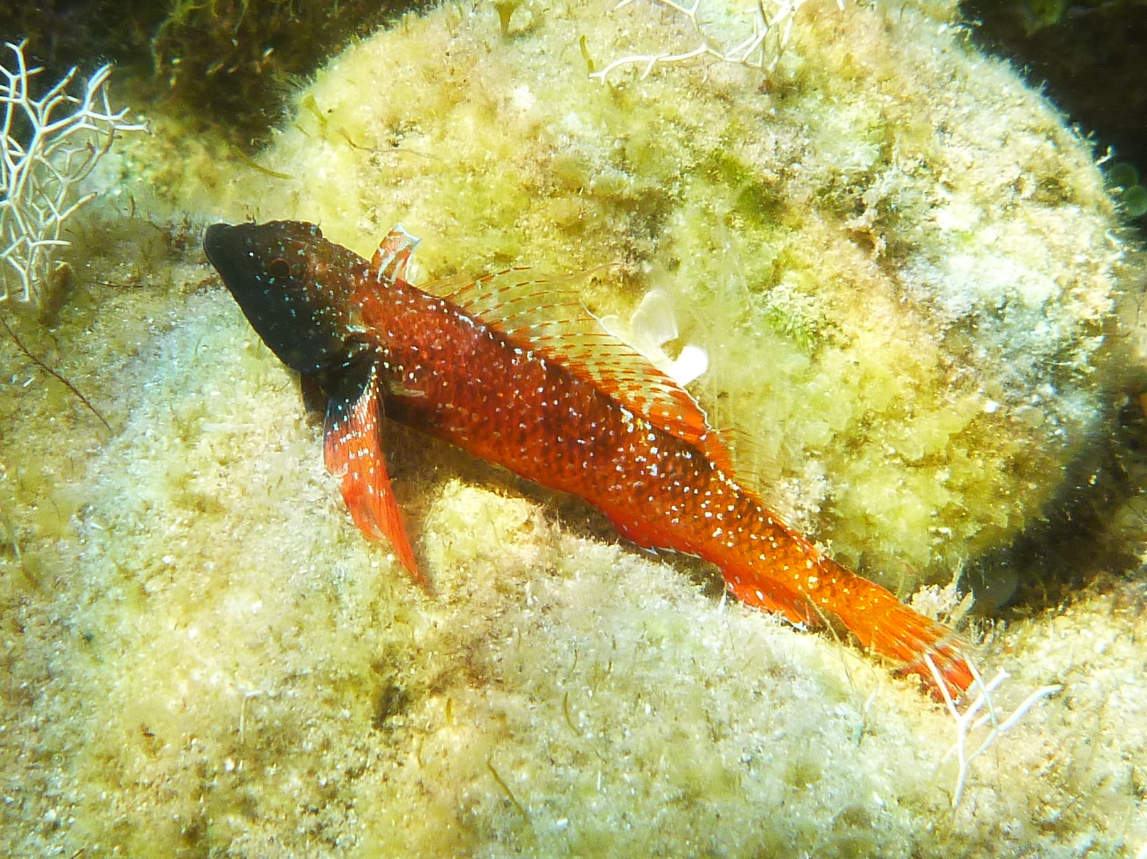 Argelès, France